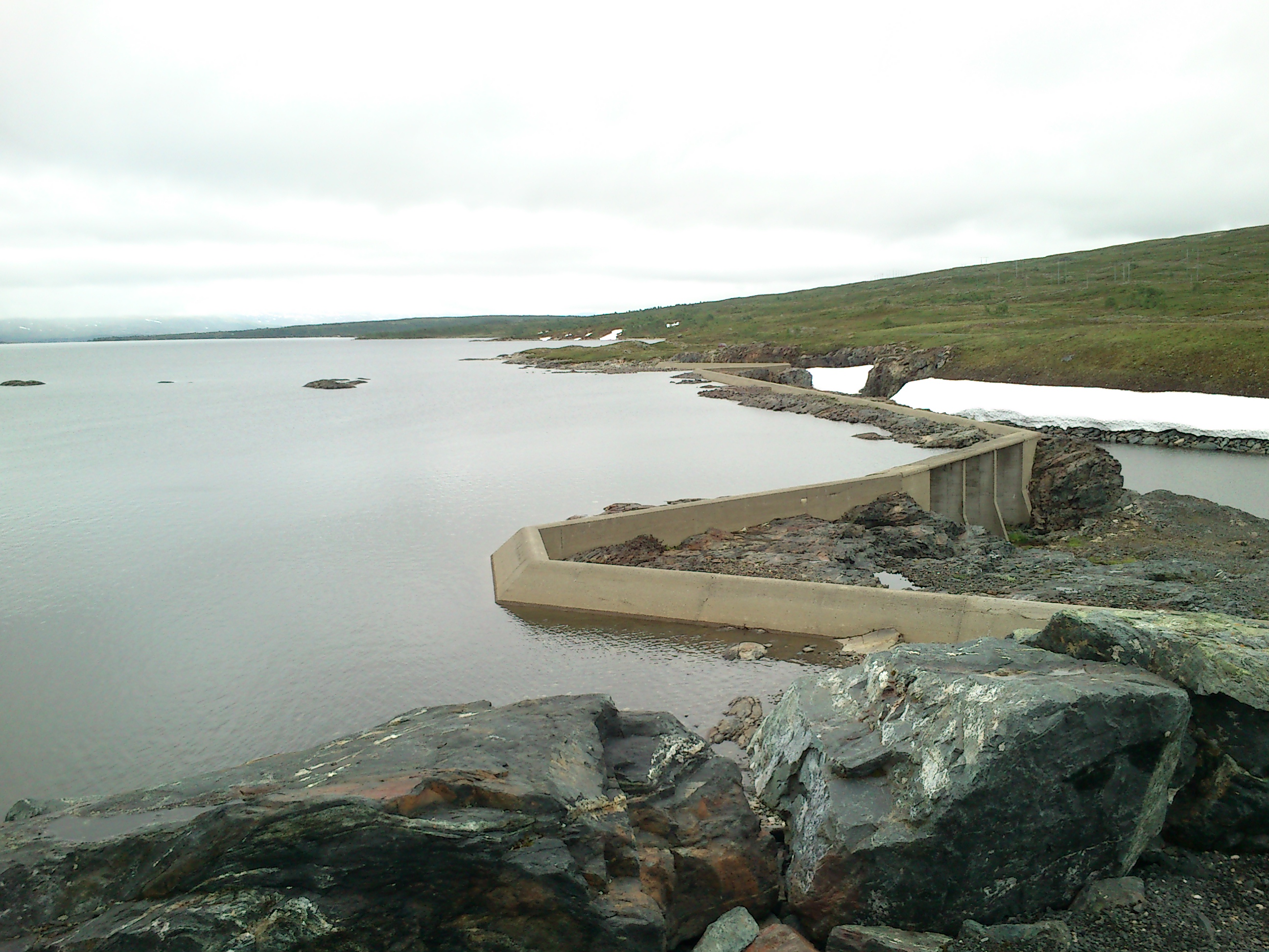 Nessdammen